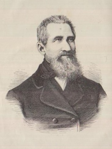 Josef Množislav Bačkora (1803 - 1876), Český pedagog.